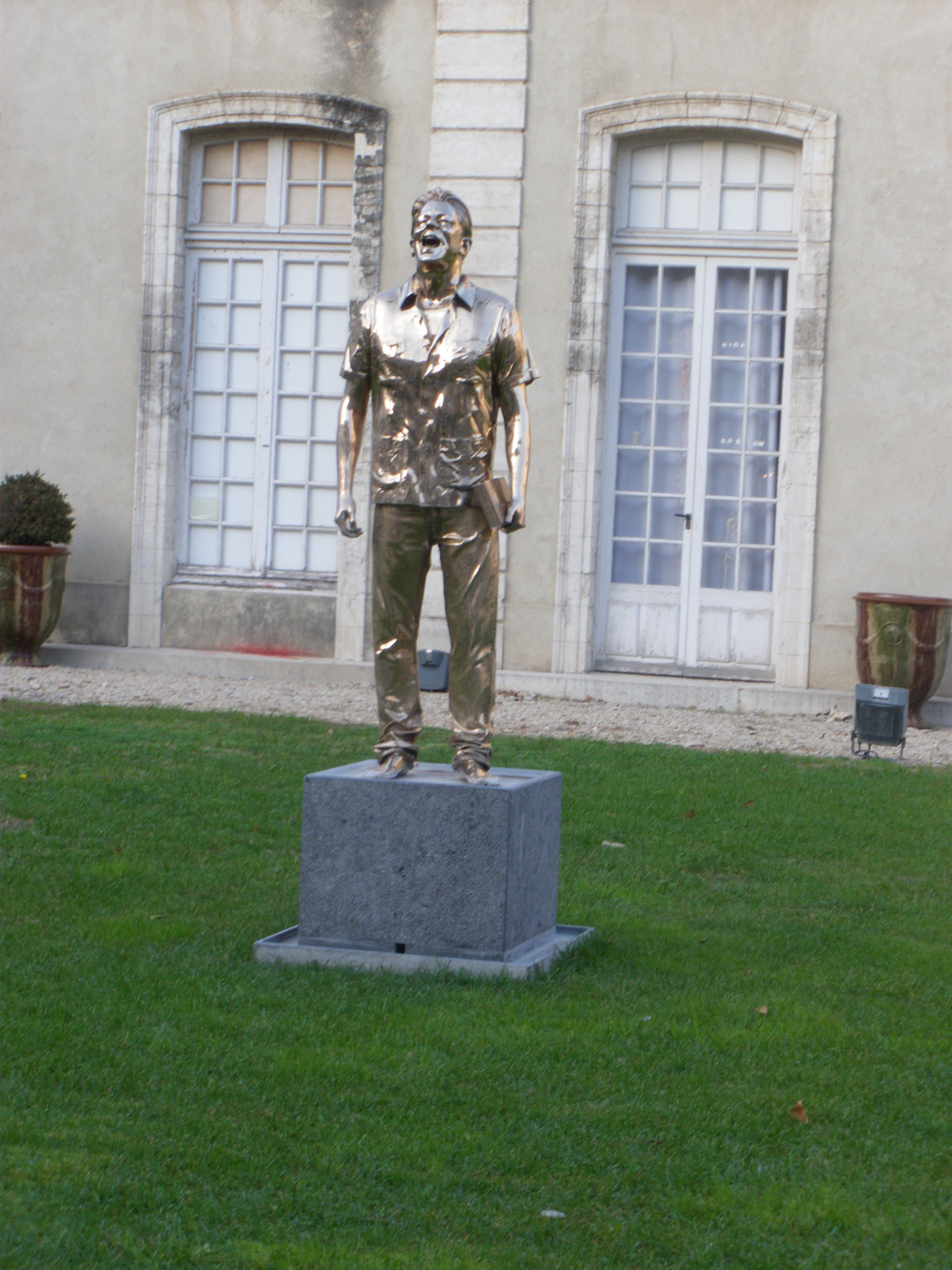 Hotel Caumont, Avignon